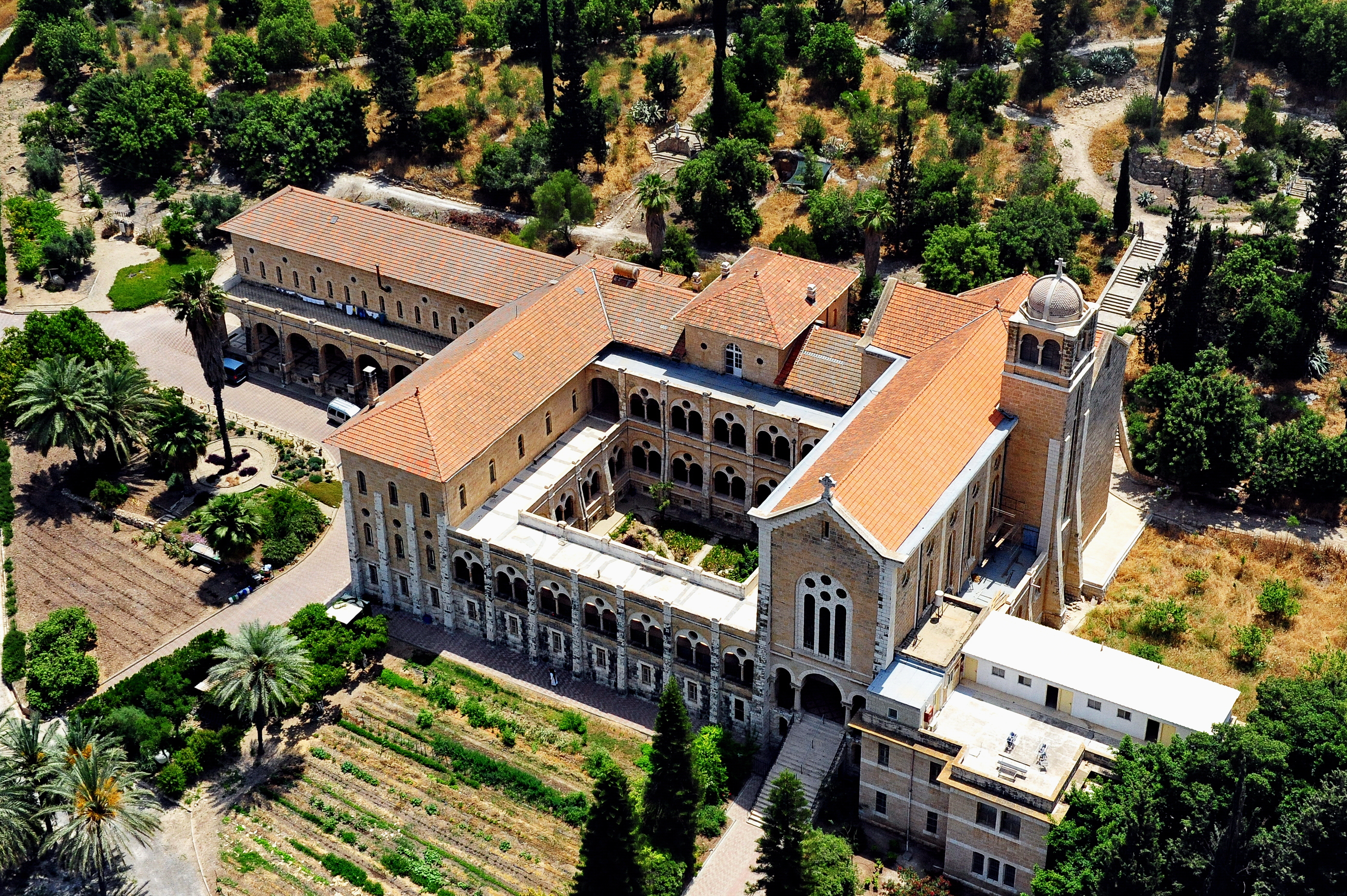 מנזר גברים בנדיקטיני-סיסטרסיאני-טרפיסטי, השוכן בלטרון, בקצהו הדרום-מזרחי של עמק איילון.